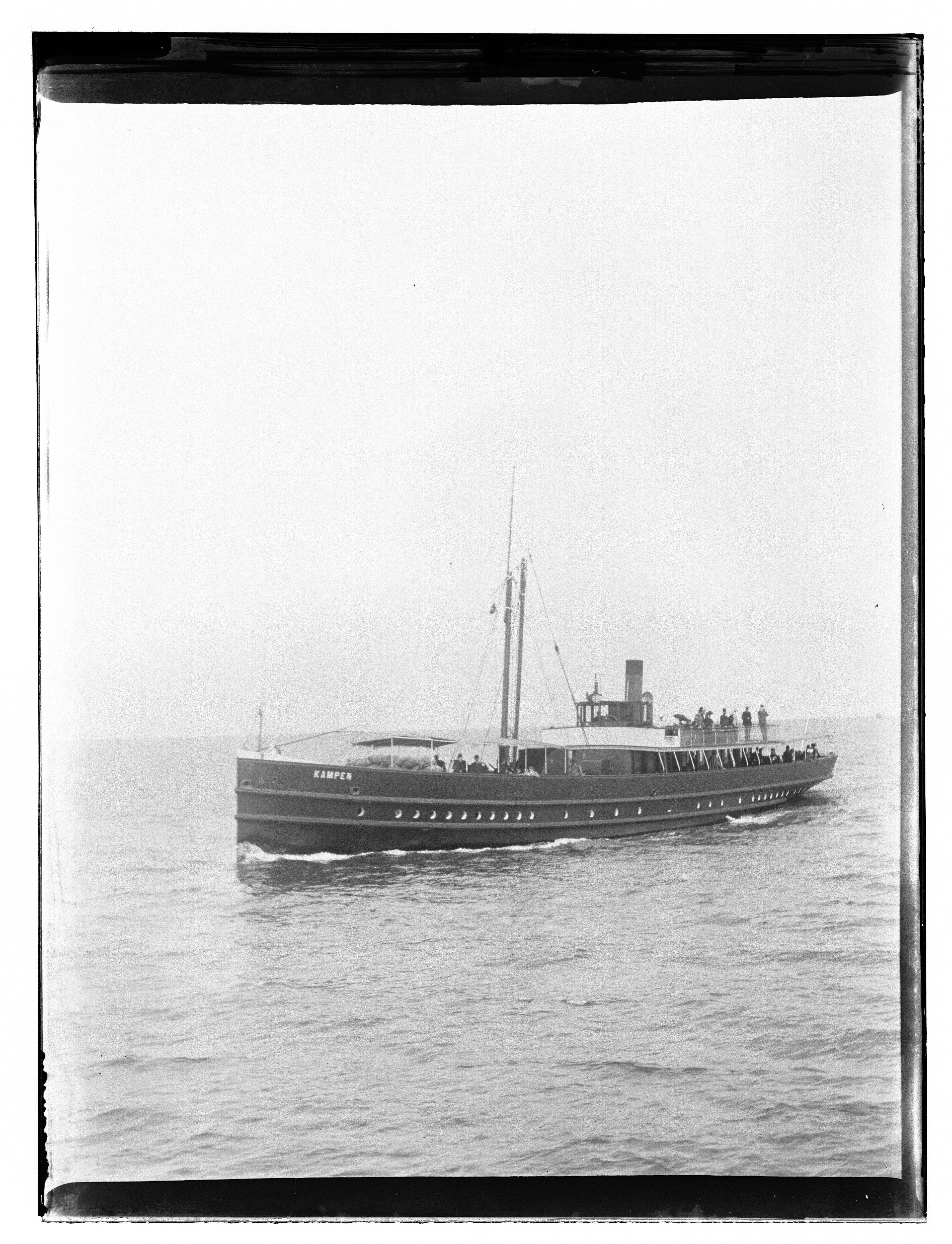 Beschrijving Zuiderzee Veerboot ss. Kampen. Documenttype foto Vervaardiger Olie``, Jacob (1834-1905) Collectie Collectie Jacob Olie Jbz. Datering juli 1902 Inventarissen Afbeeldingsbestand 010019001490 Generated with Dememorixer